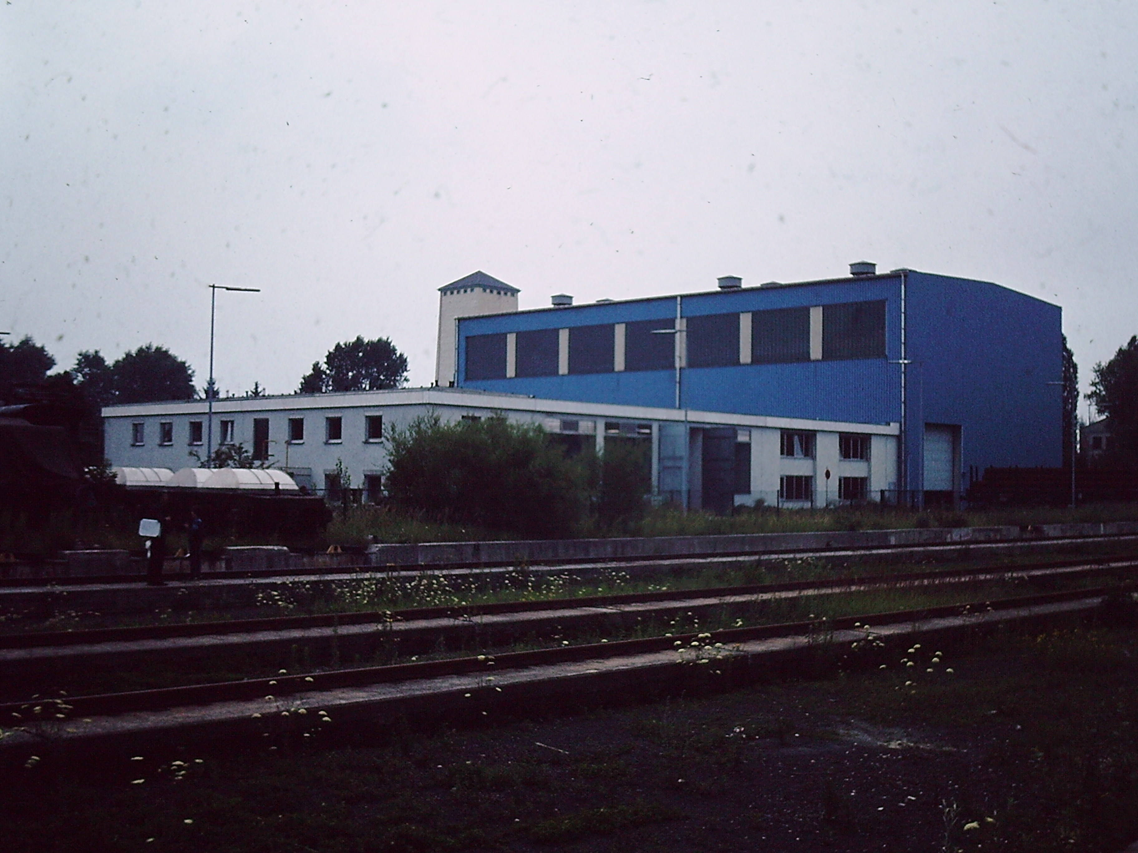 Rollprüfstand München-Freimann vom Gelände des Ausbesserungswerks gesehen